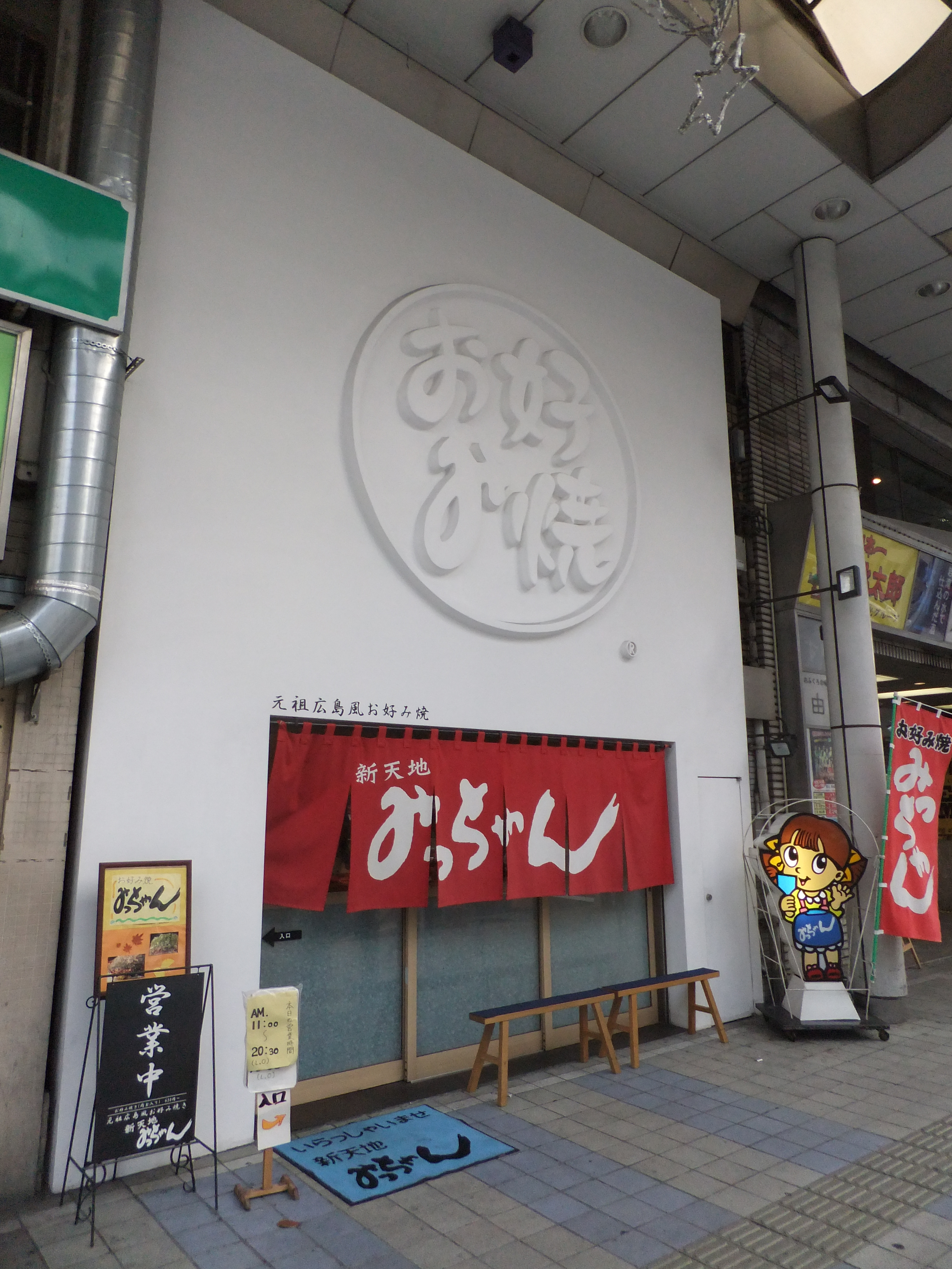 みっちゃん新天地